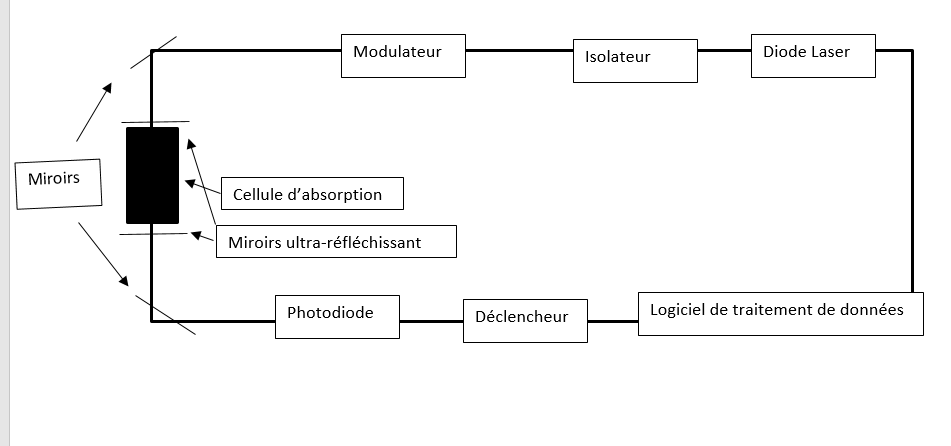 Schéma cdrs simplifié